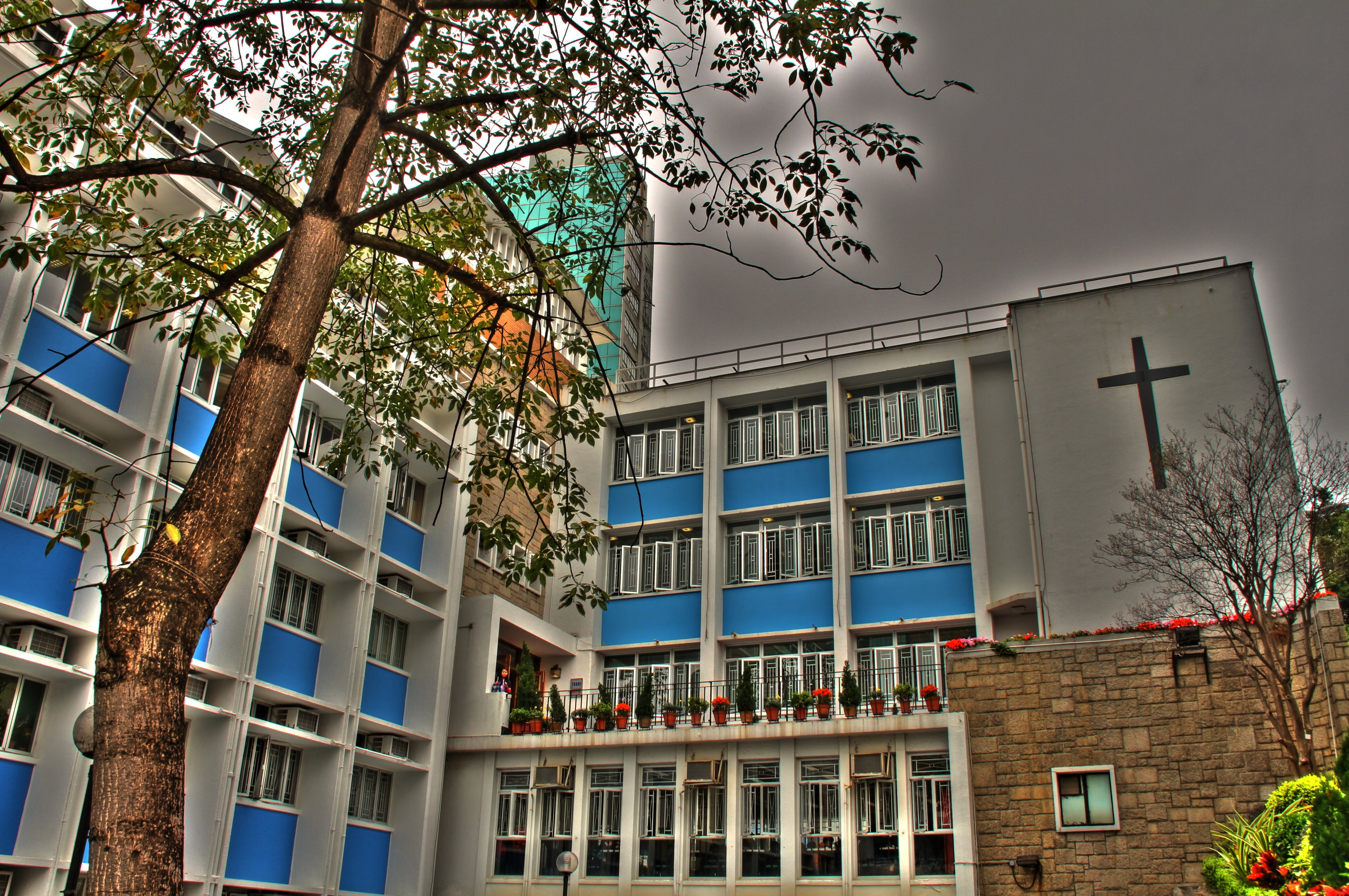 香港循道中學